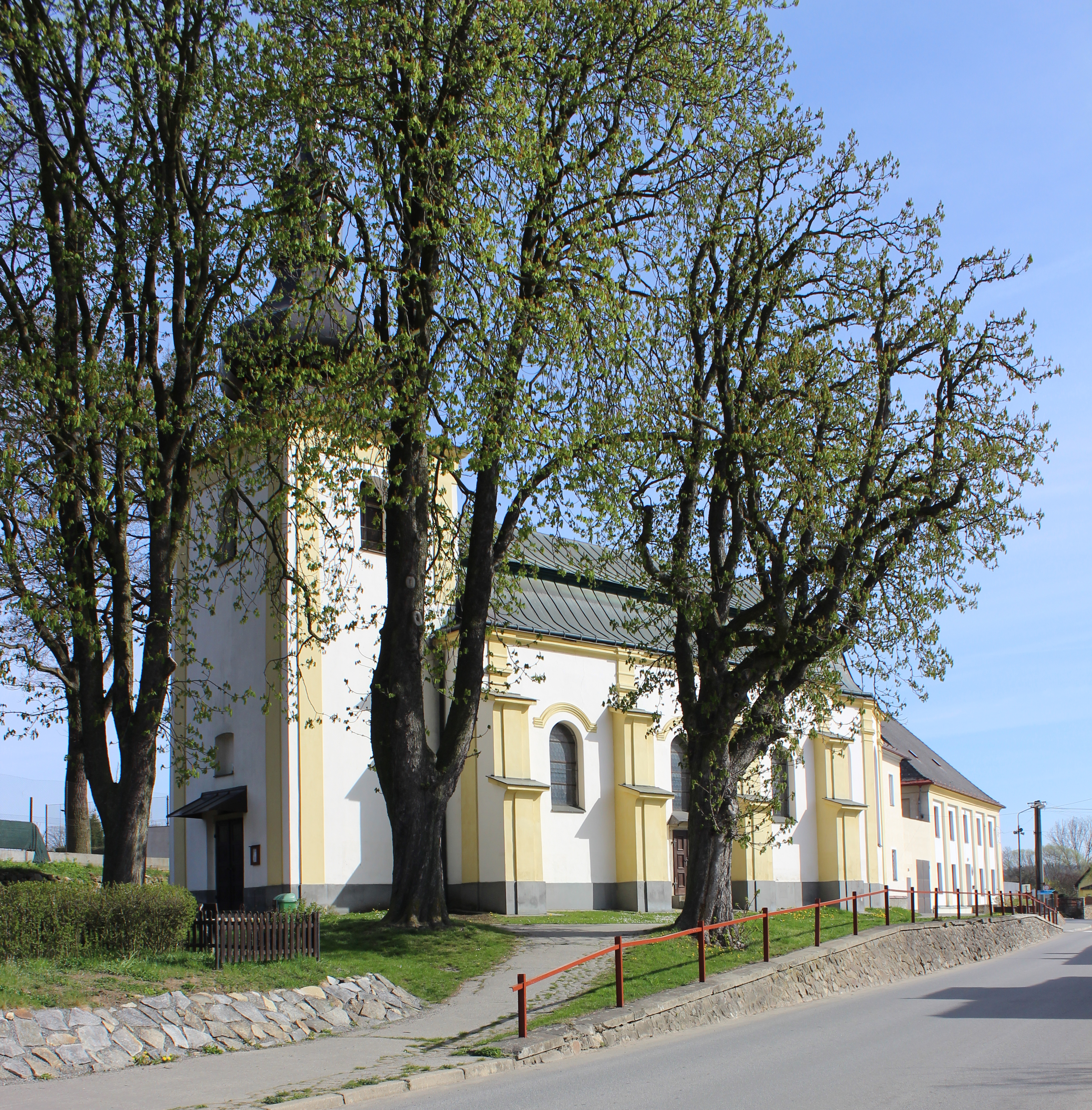 Kostel svatého Vavřince v Rynárci v okrese Pelhřimov. Project: Fotíme Česko.